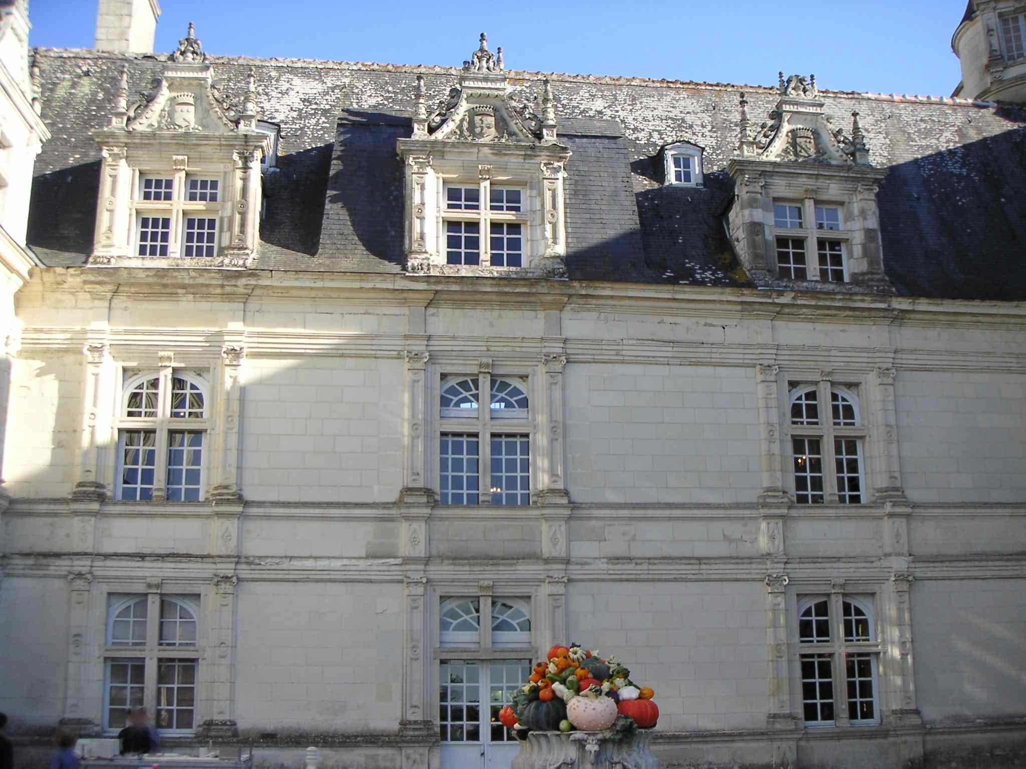 Aile centrale du château de Villandry (France)